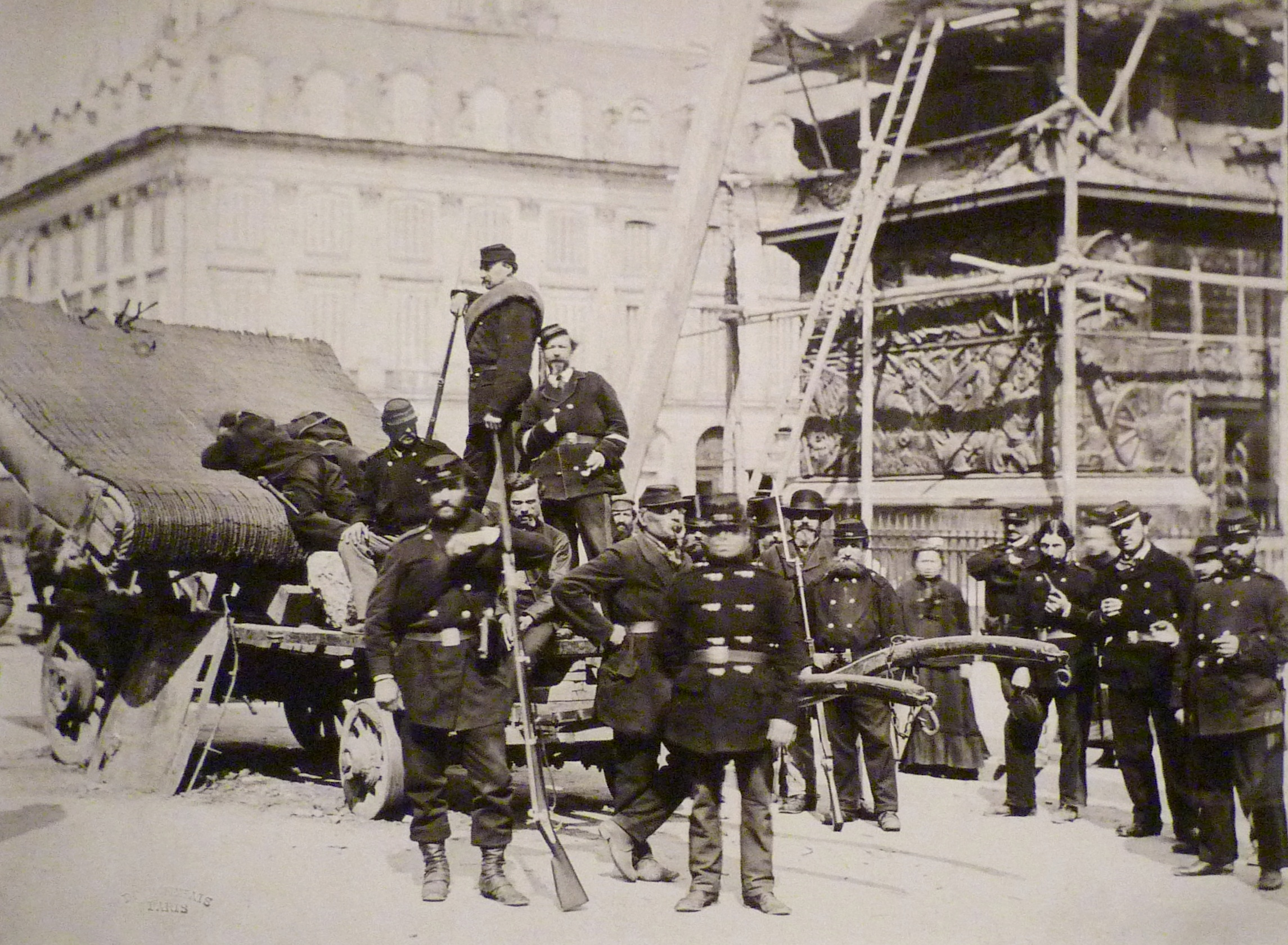 Exposition La Commune de Paris à l'Hôtel de Ville de Paris (18 mars - 28 mai 2011) - Gardes nationaux et curieux sur la colonne Vendôme renversée le 16 mai 1871 - Photo de Bruno Braquehais.